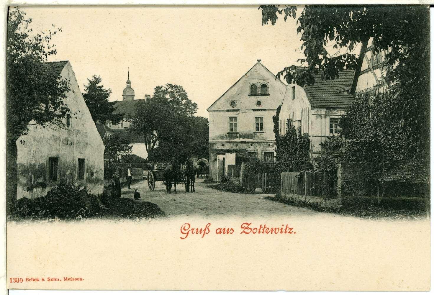 Zottewitz; Dorfstraße This postcard is from publisher Brück & Sohn in Meißen ( postcard has a unique number 01330 and is available in a higher resolution at the publisher. This images was uploaded in a cooperation project between Wikipedians and the publisher.